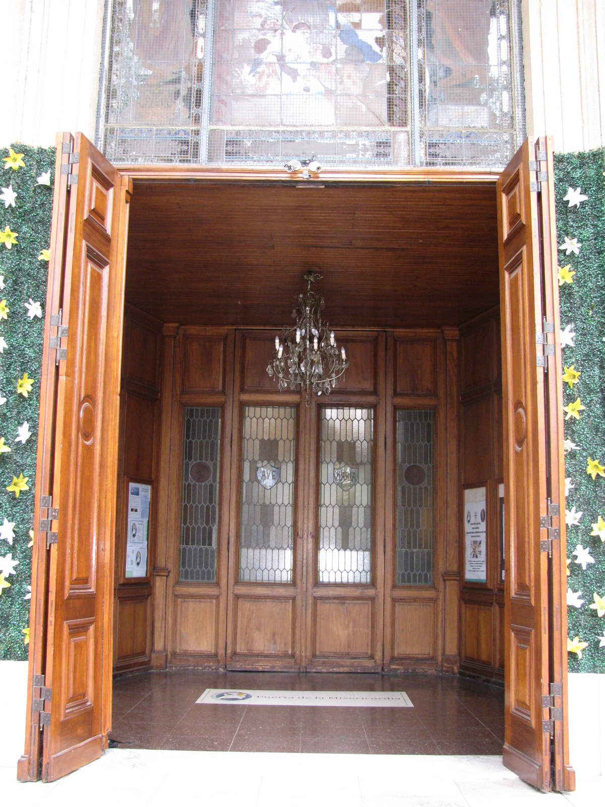 Acceso